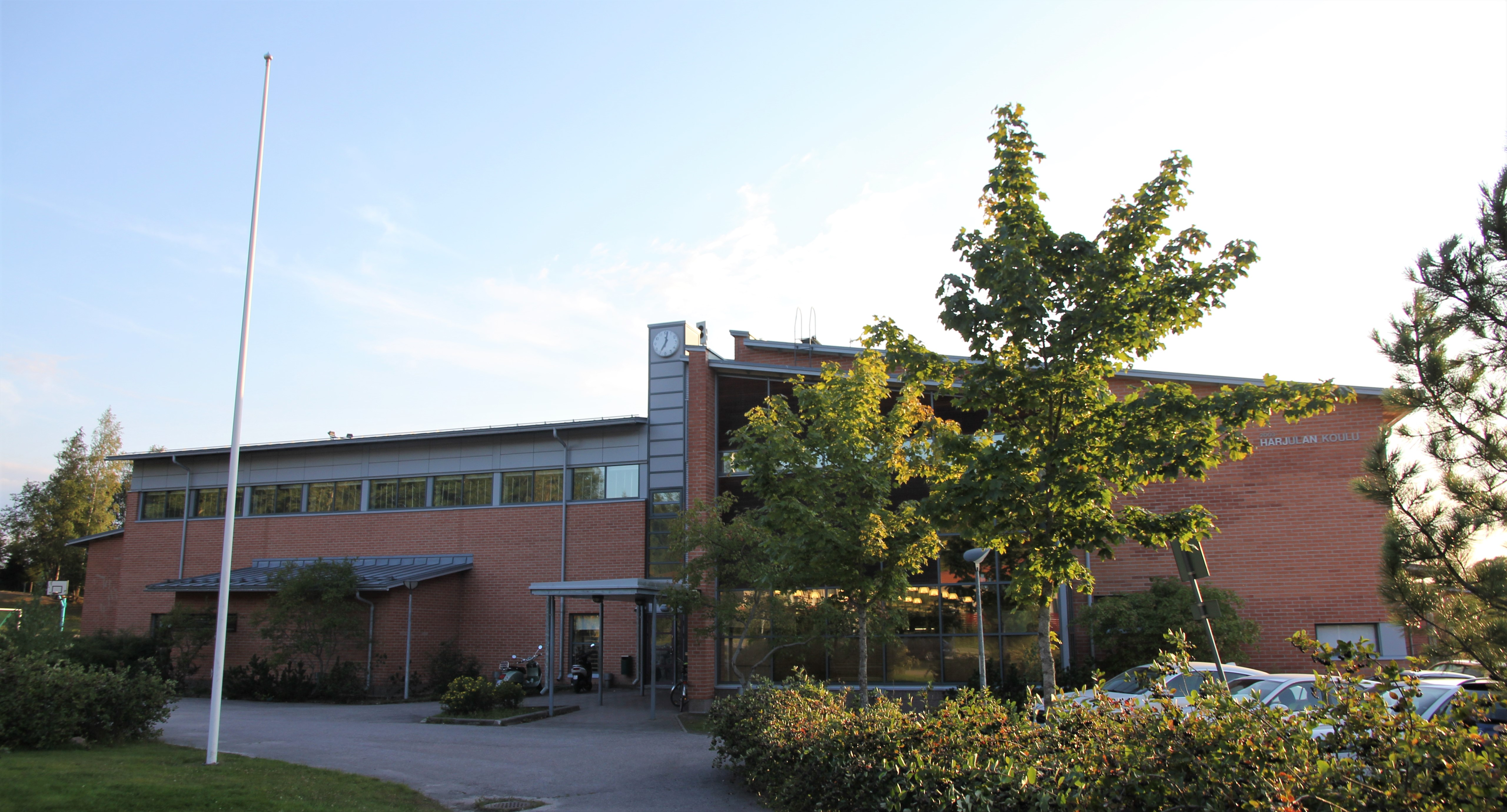 Harjulan koulu on Nurmijärven Klaukkalassa, Harjulan asuinalueella toimiva alakoulu. Sen osoite on Viljelystie 30, 01840 Klaukkala, Nurmijärvi.